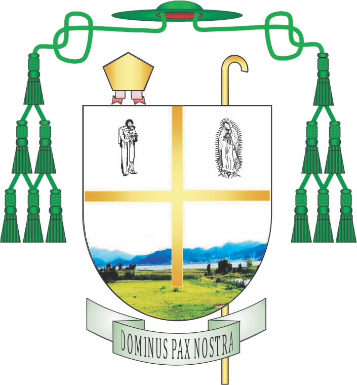 escudo obispo